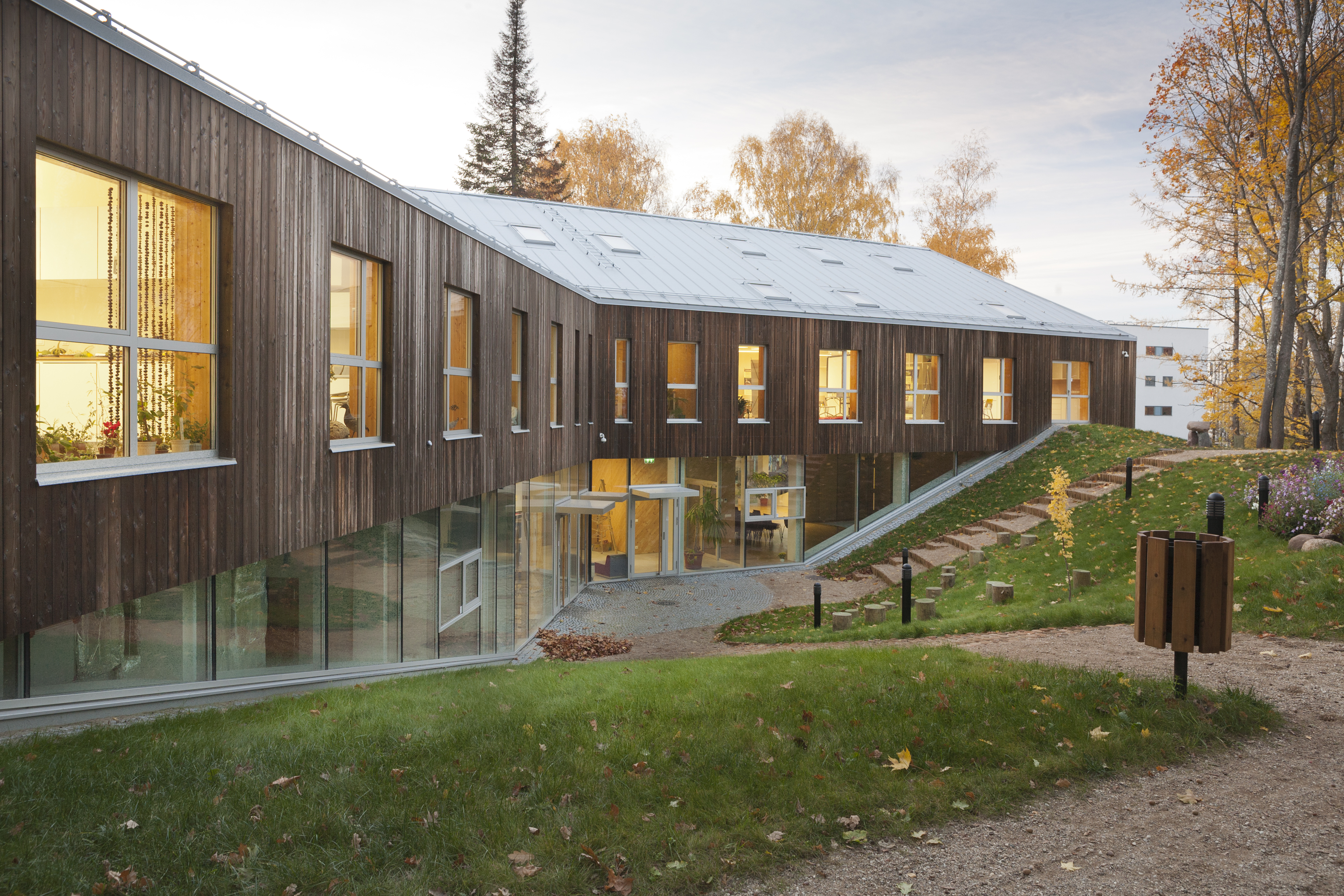 Tartu loodusmaja foto autor Jaan Sokk